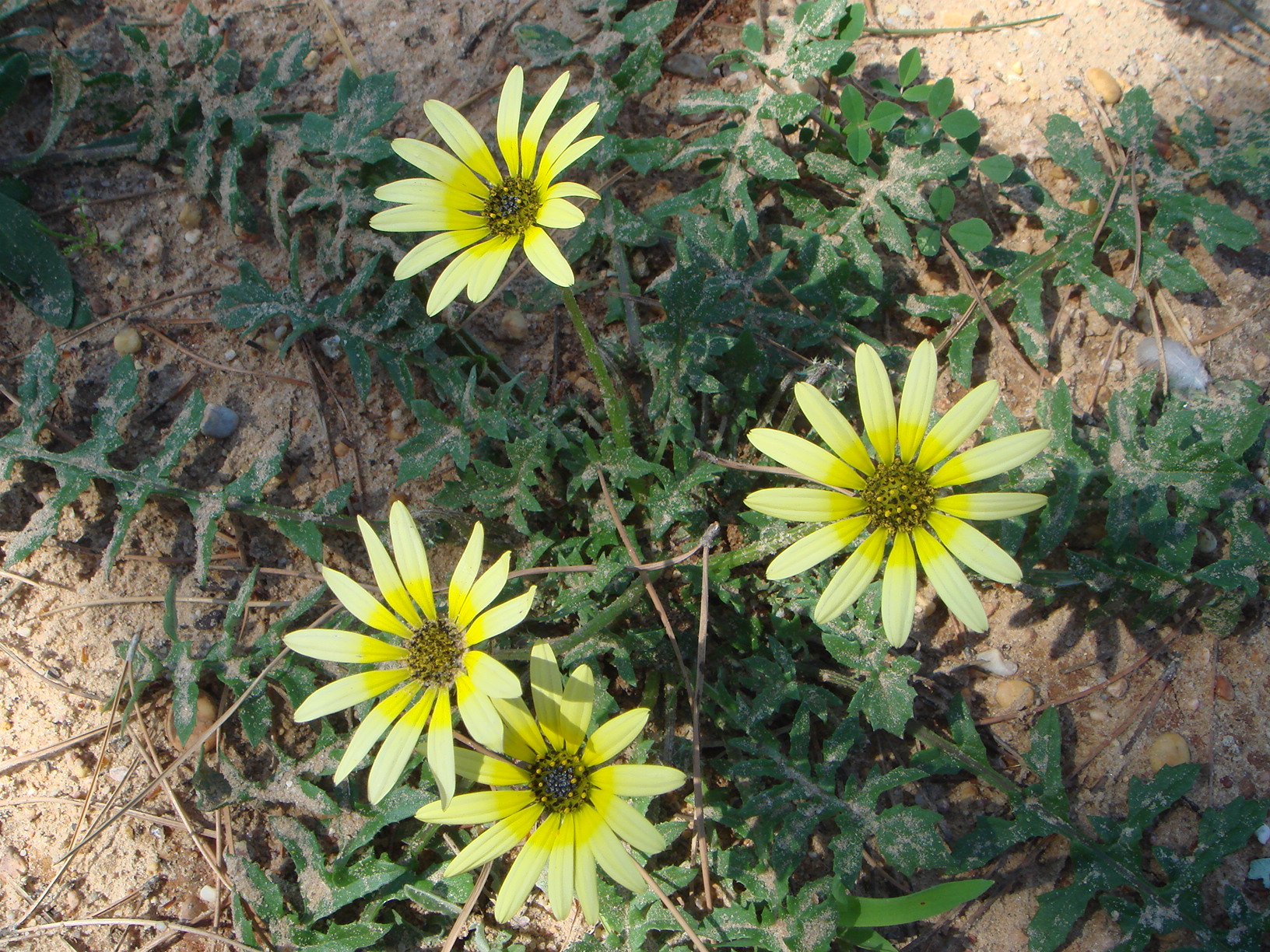 Arctotheca calendula Chiclana, Cádiz, España